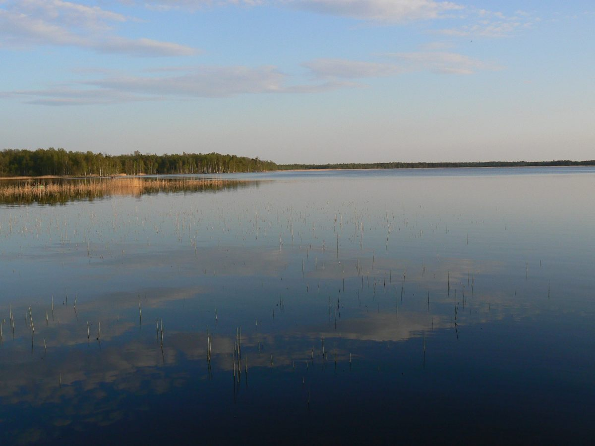 Veskijärv